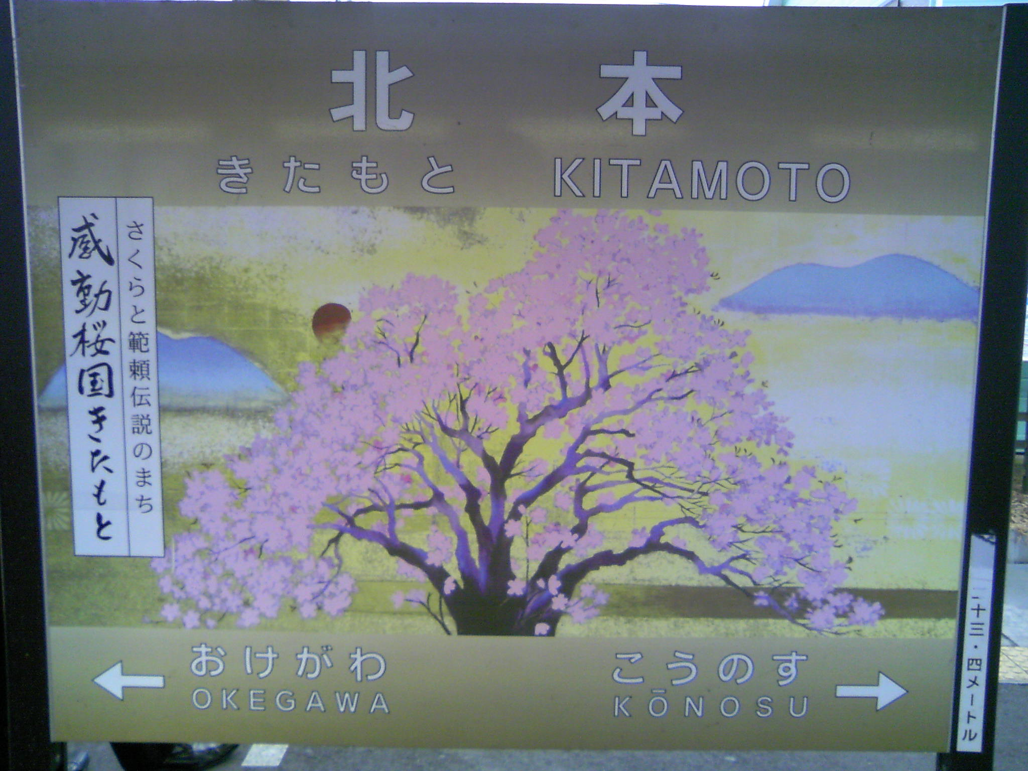 北本駅の駅名標